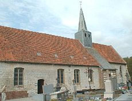 vue de l'église de Nielles-lès-Ardres côté sud.